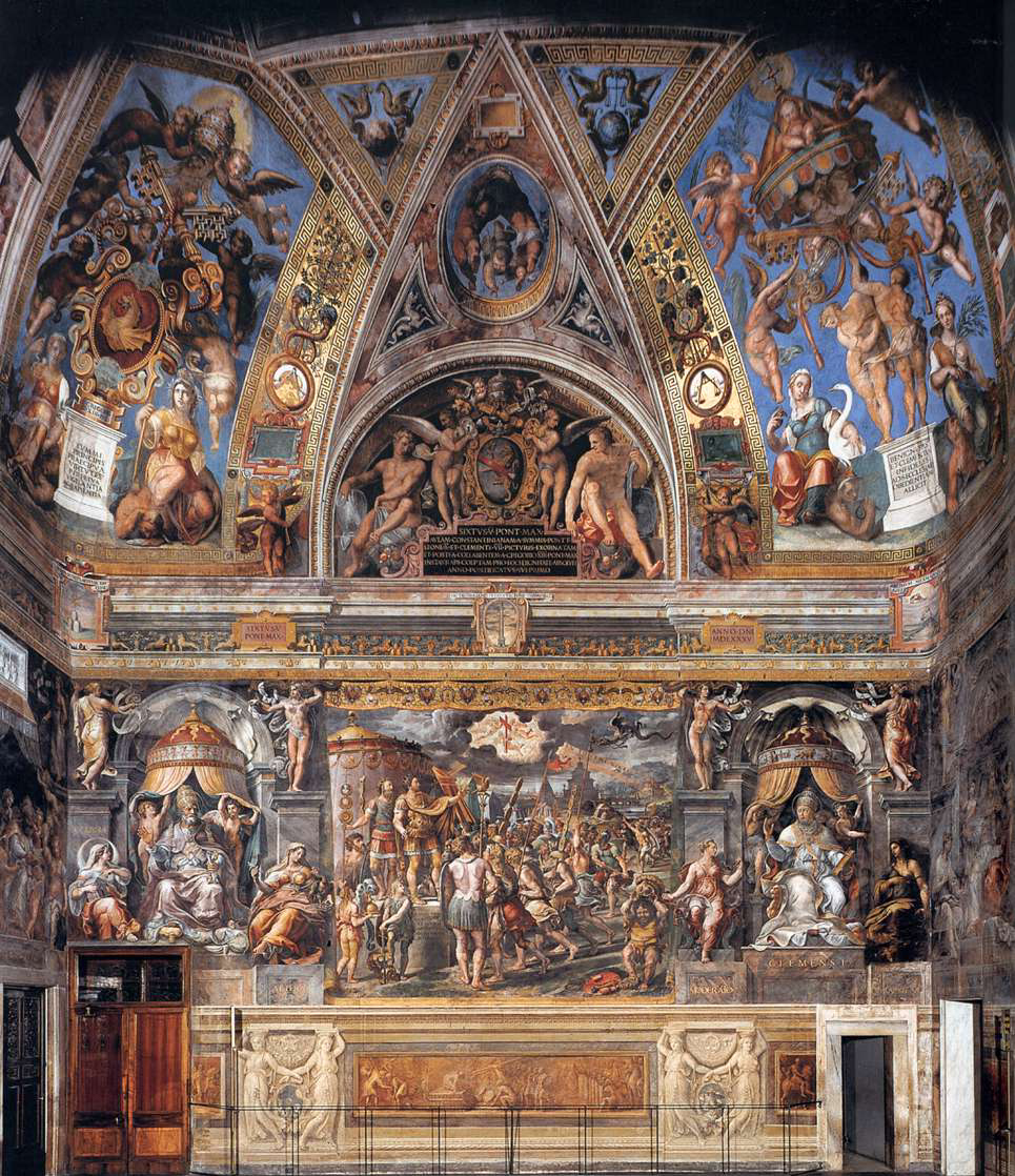 View of the Sala di Constantino Fresco Sala di Constantino, Palazzi Pontifici, Vatican